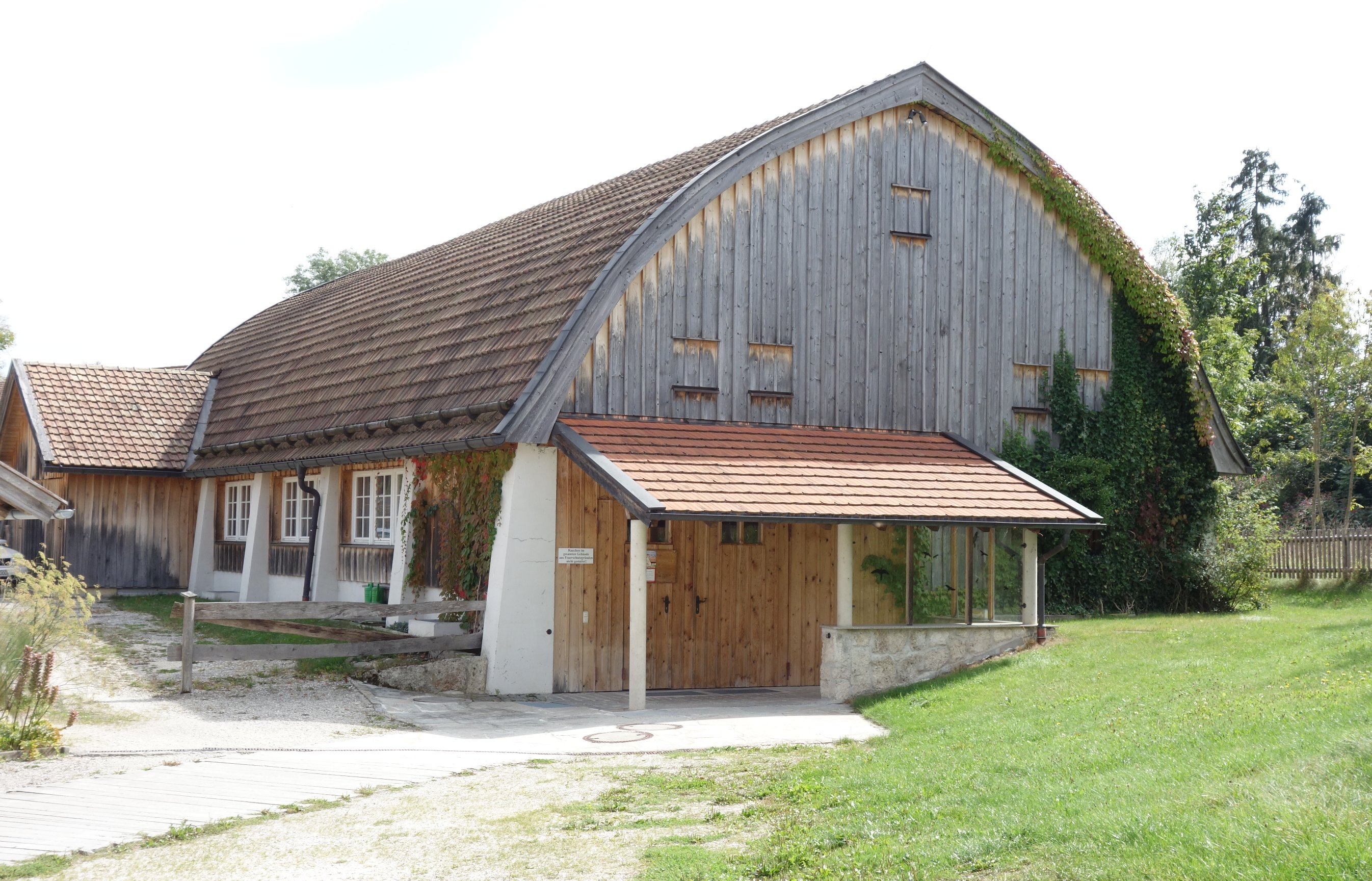 Die Zollingerhalle im Orgelzentrum Valley